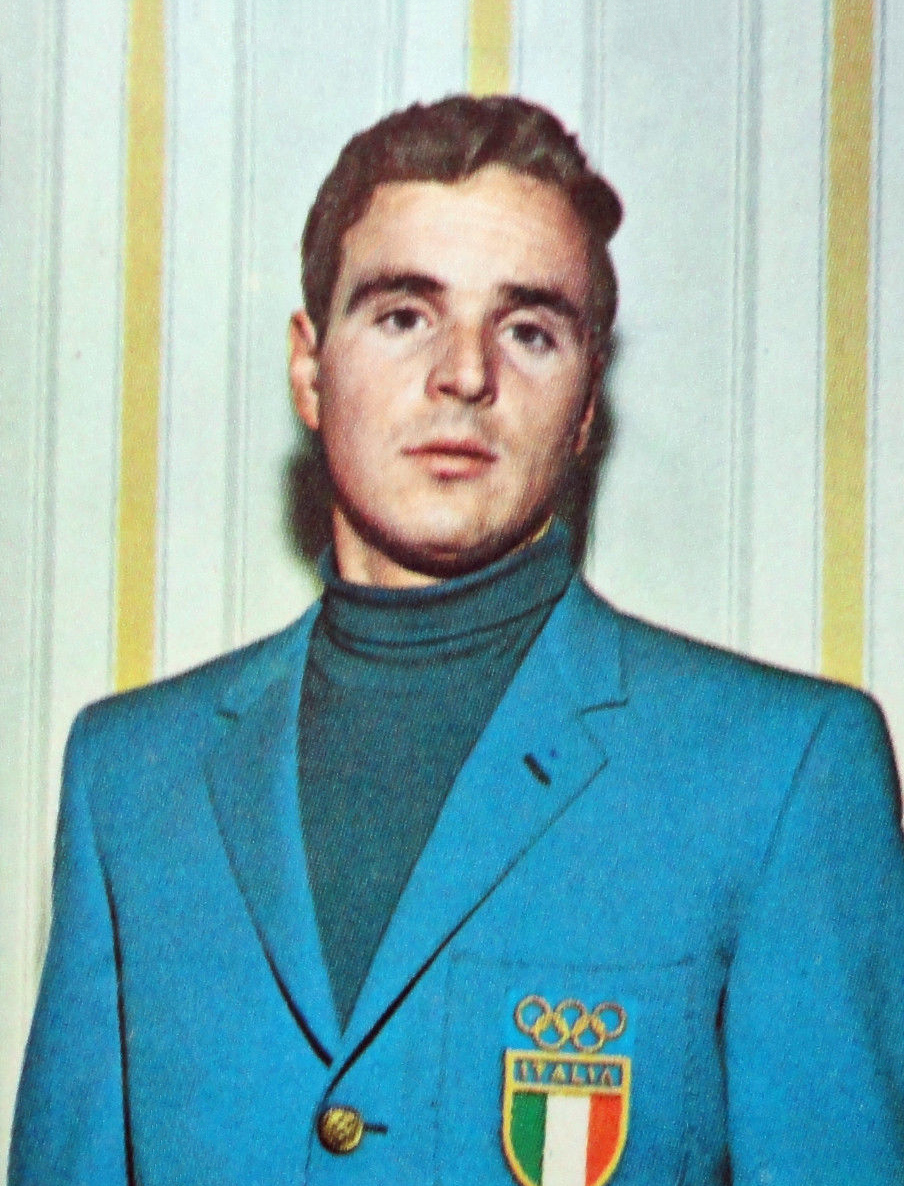 Figurina/Sticker CAMPIONI DELLO SPORT 1968/69-n.340-GERARDO MUSSNER-ITALIA-rec